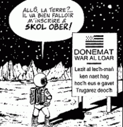 Tresadenn bet graet gant Alan Dipode evit brudañ Skol Ober.